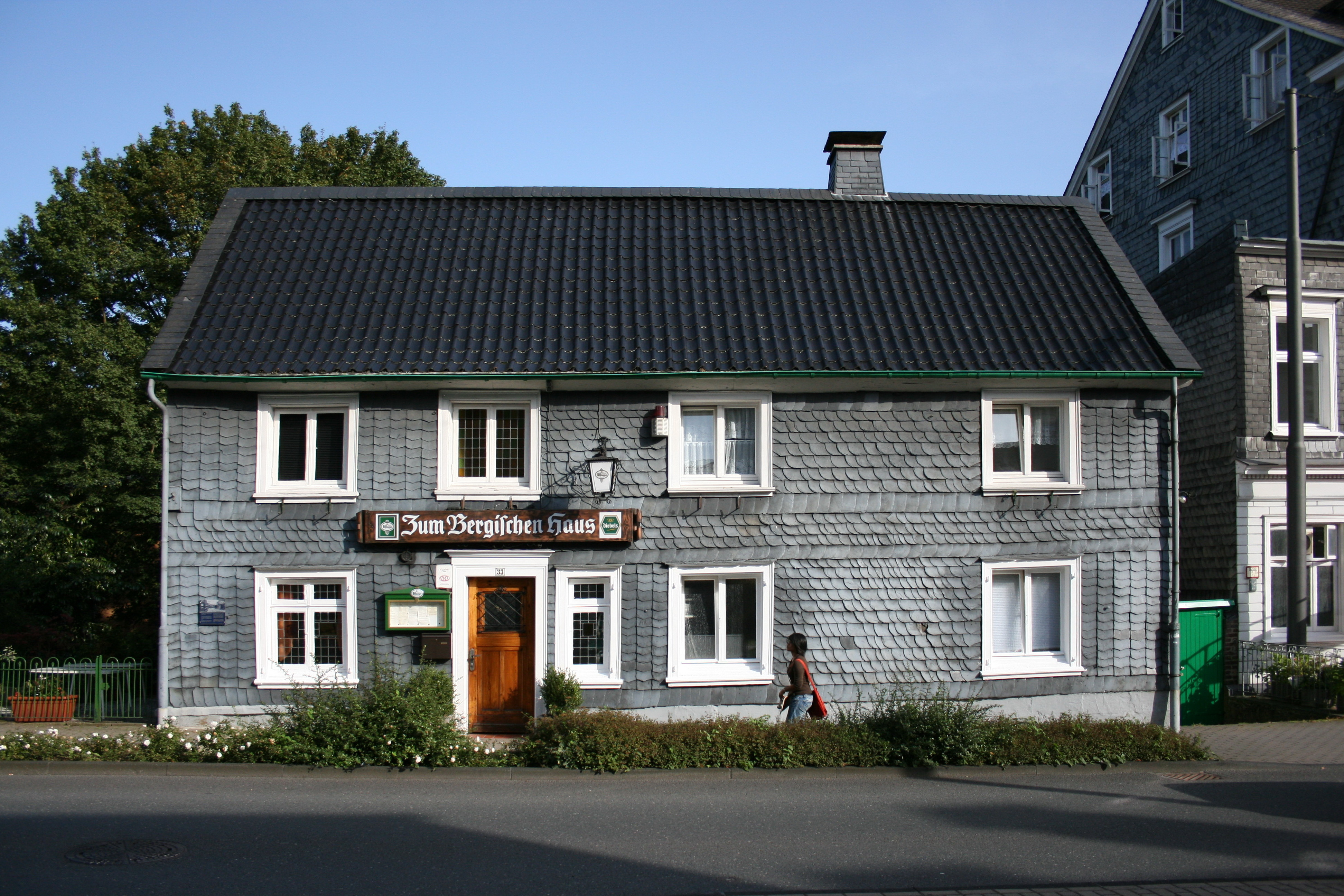 Wuppertal-Ronsdorf: Restaurant Zum Bergischen Haus